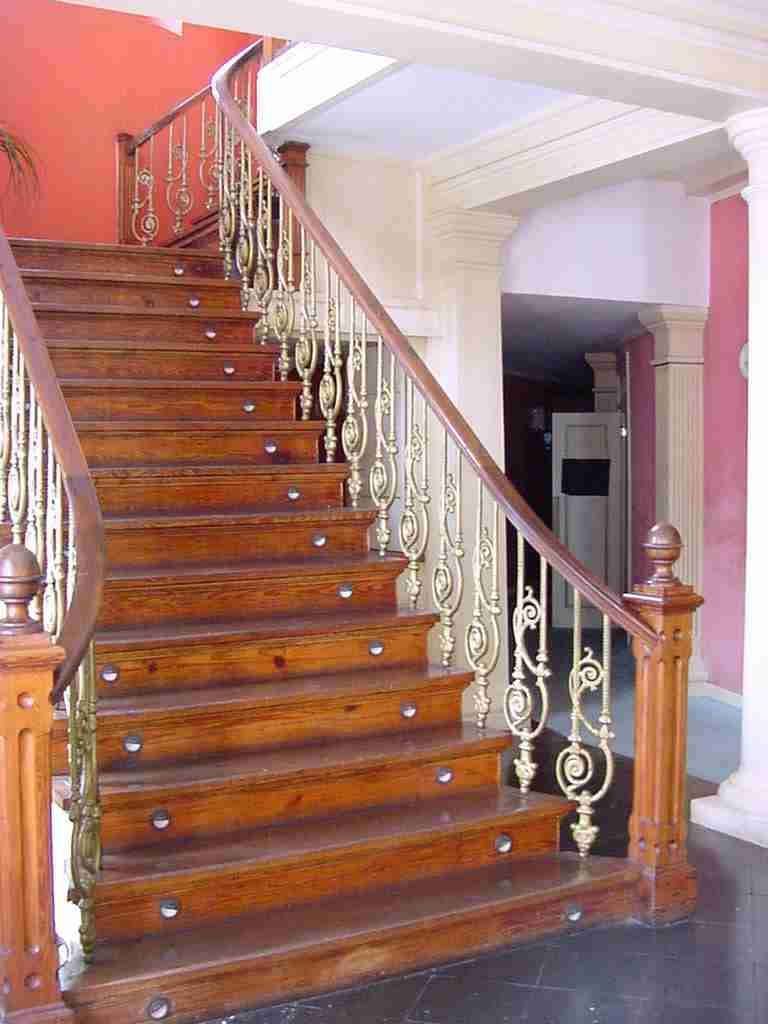 Teatro Angrense, escadarias